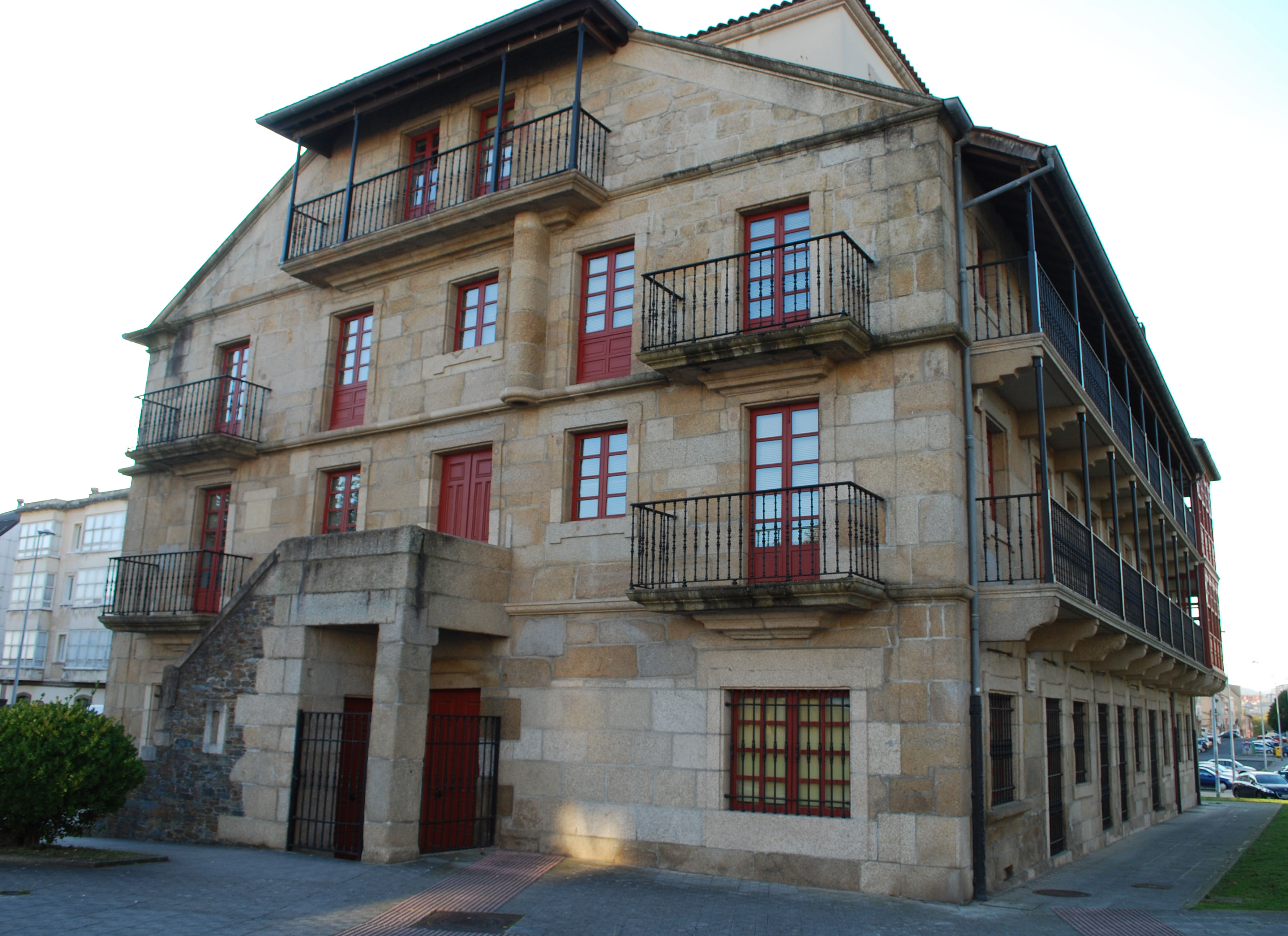 Biblioteca Casa do Patín Campus de Esteiro Universidade da Coruña Galiza Spain